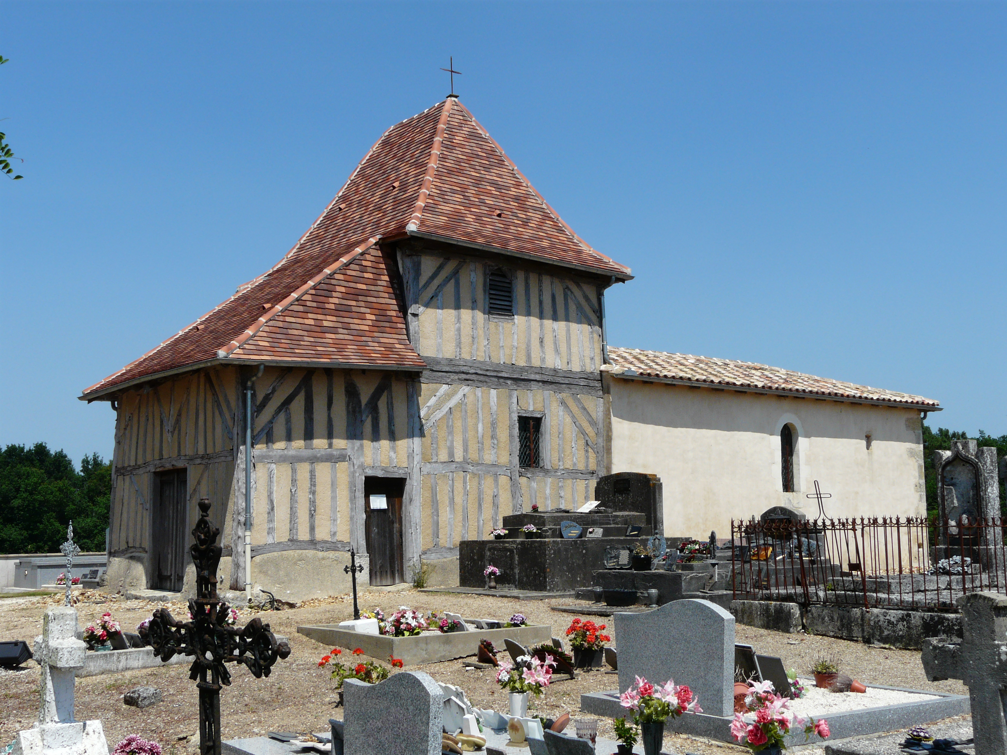 L'église de la Transfiguration de Notre-Seigneur, Saint-Sauveur-Lalande, Dordogne, France.